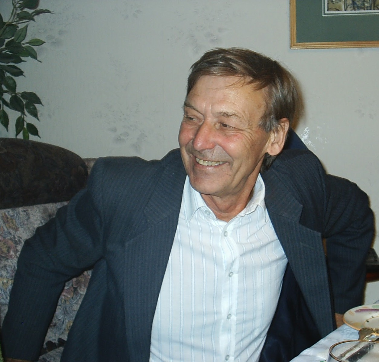 2003 г.